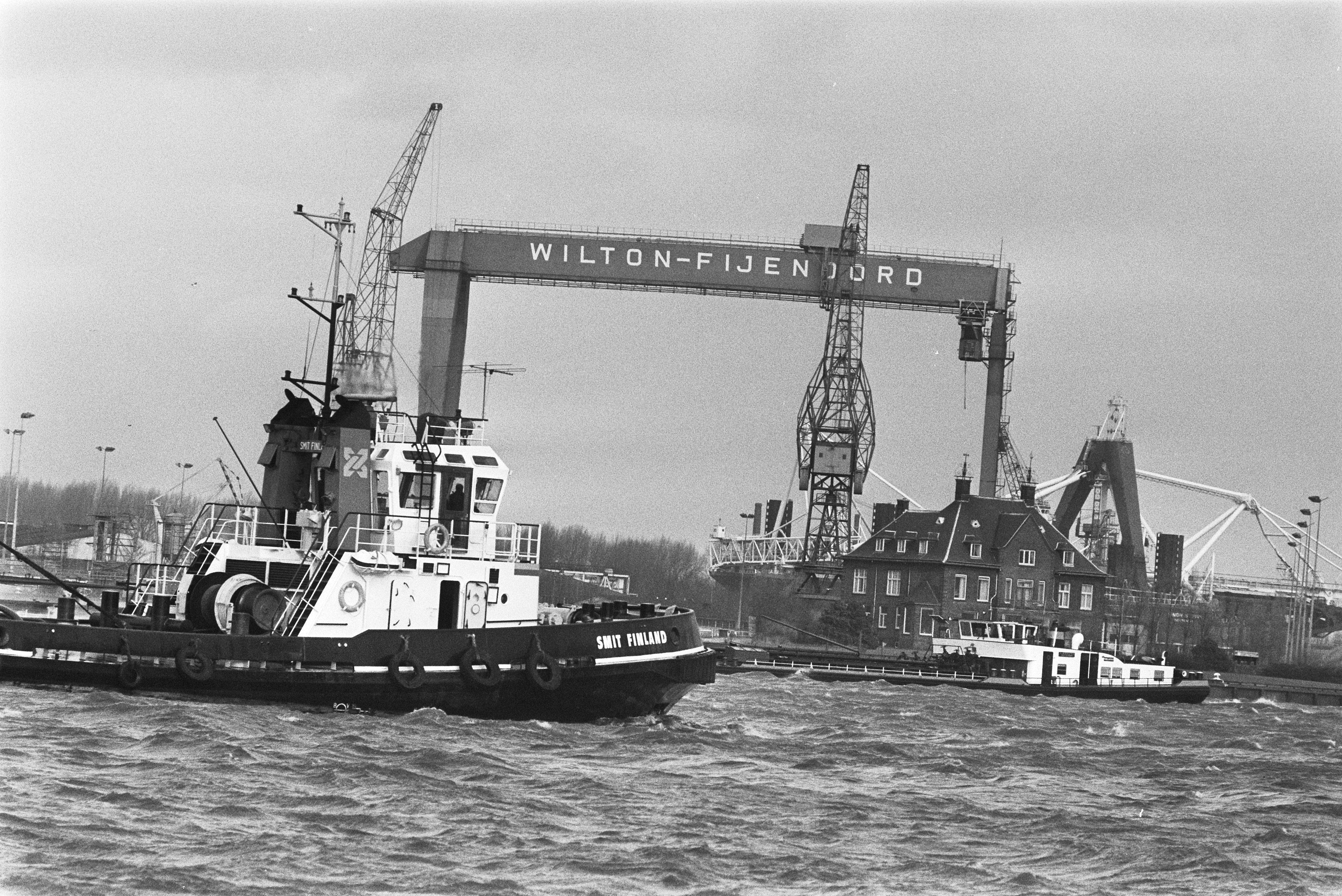 Collectie / Archief : Fotocollectie Anefo Reportage / Serie : [ onbekend ] Beschrijving : Scheepreparatiewerf Wilton Fijenoord in Schiedam Datum : 17 januari 1984 Locatie : Schiedam, Zuid-Holland Trefwoorden : werven Instellingsnaam : Wilton-Fijenoord Fotograaf : Bogaerts, Rob / Anefo Auteursrechthebbende : Nationaal Archief Materiaalsoort : Negatief (zwart/wit) Nummer archiefinventaris : bekijk toegang 2.24.01.05 Bestanddeelnummer : 932-8353